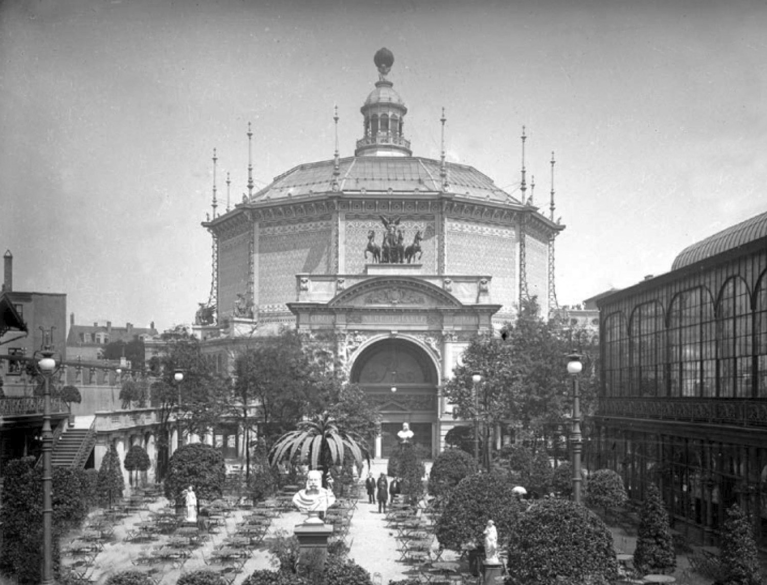 Die Alberthalle Leipzig auf dem Gelände des Krystallpalasts